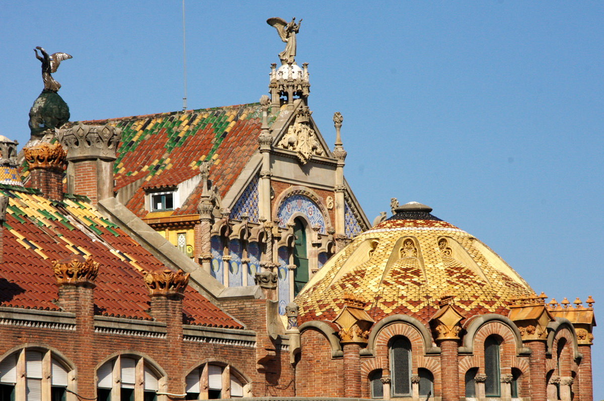 Cobertes de diversos pavellons de l'hospital de Sant Pau (Barcelona, Catalunya), obra modernista de 1905. El disseny és de l'arquitecte Lluís Domènech i Montaner, La ceràmica que es mostra a la imatge era obra de la fàbrica Pujol i Bausis de Cornellà de Llobregat i de la fàbrica de Josep Orriols i Pons. L'edifici del fons és el pavelló d'operacions amb escultures de Pau Gargallo